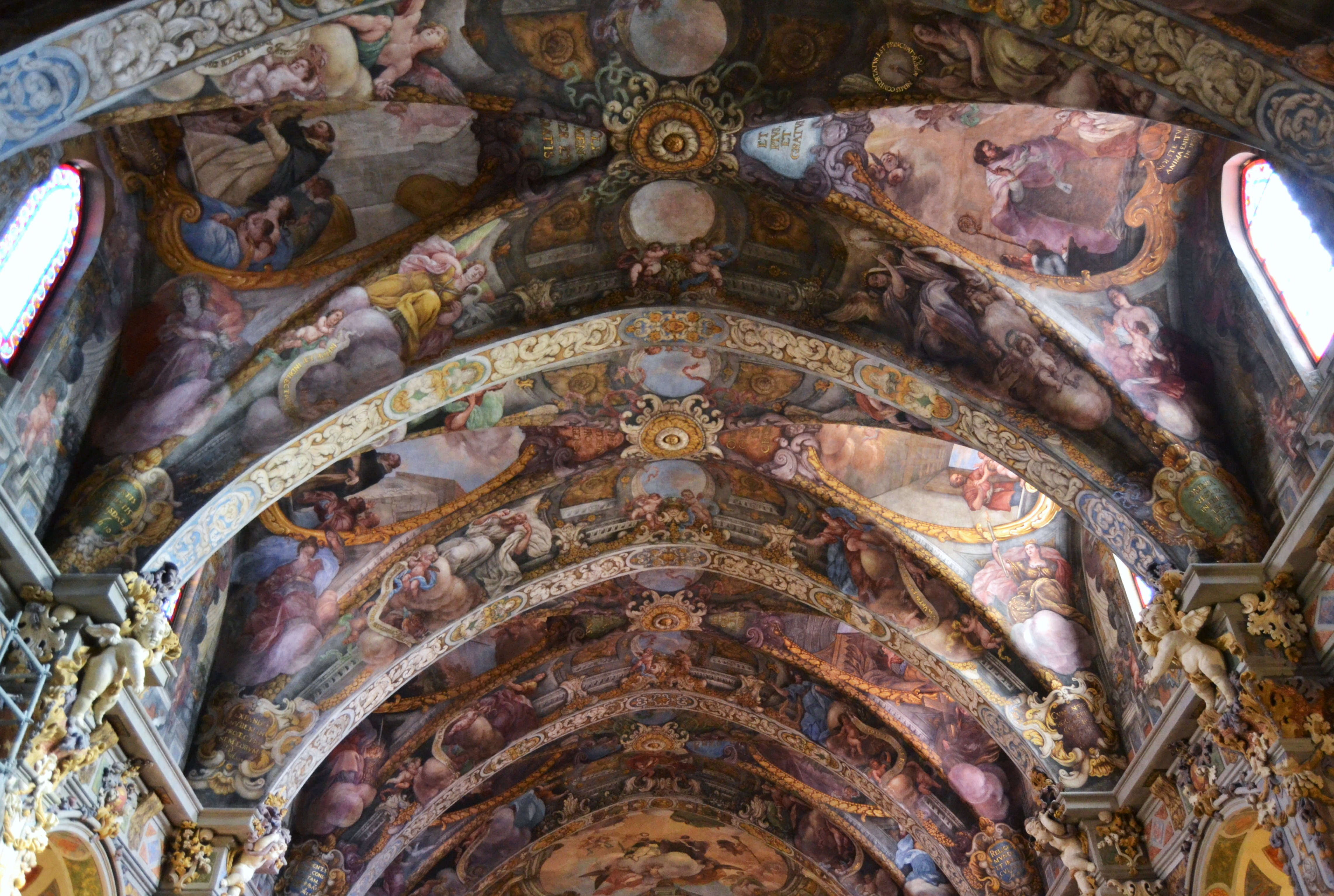 Voltes de l'església de sant Nicolau, València.